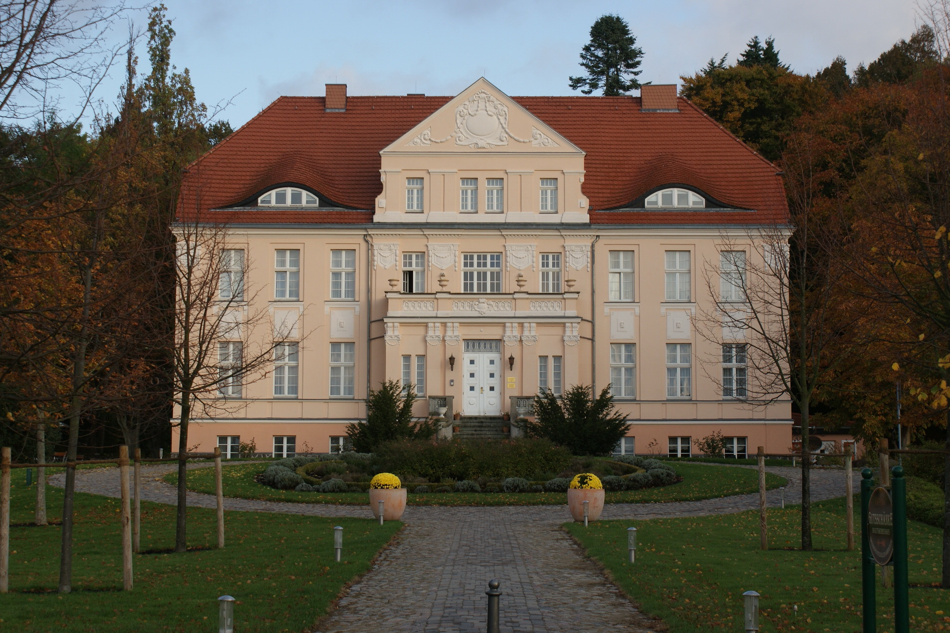 Neddesitz, Landkreis Vorpommern-Rügen. Herrenhaus der Gutsanlage. Teil des Hotels Jasmar Resort Rügen.